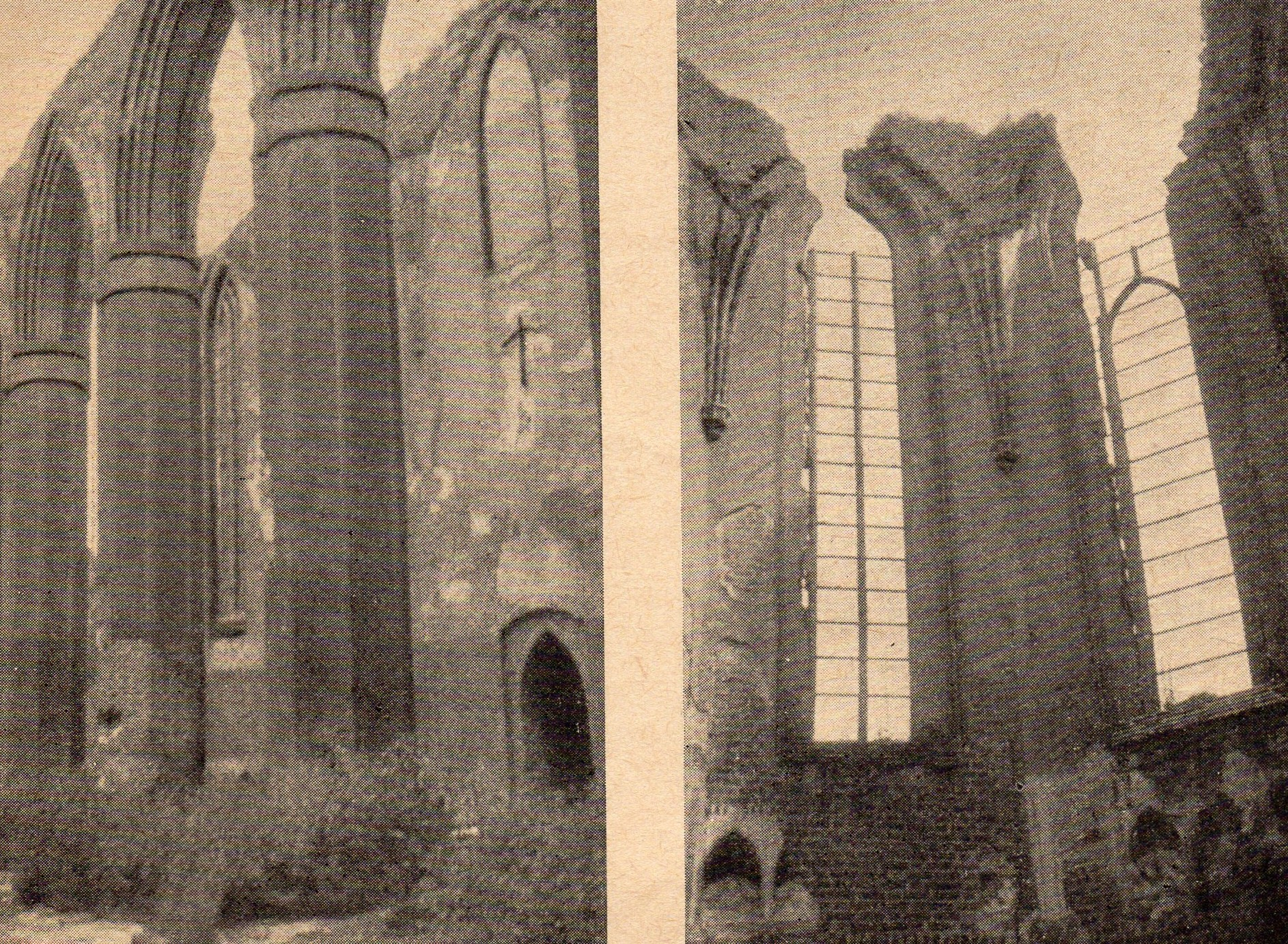 Fara braniewska w 1966r.